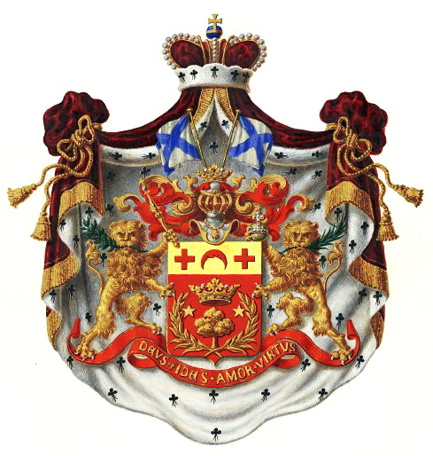 Герб рода Епанчиных